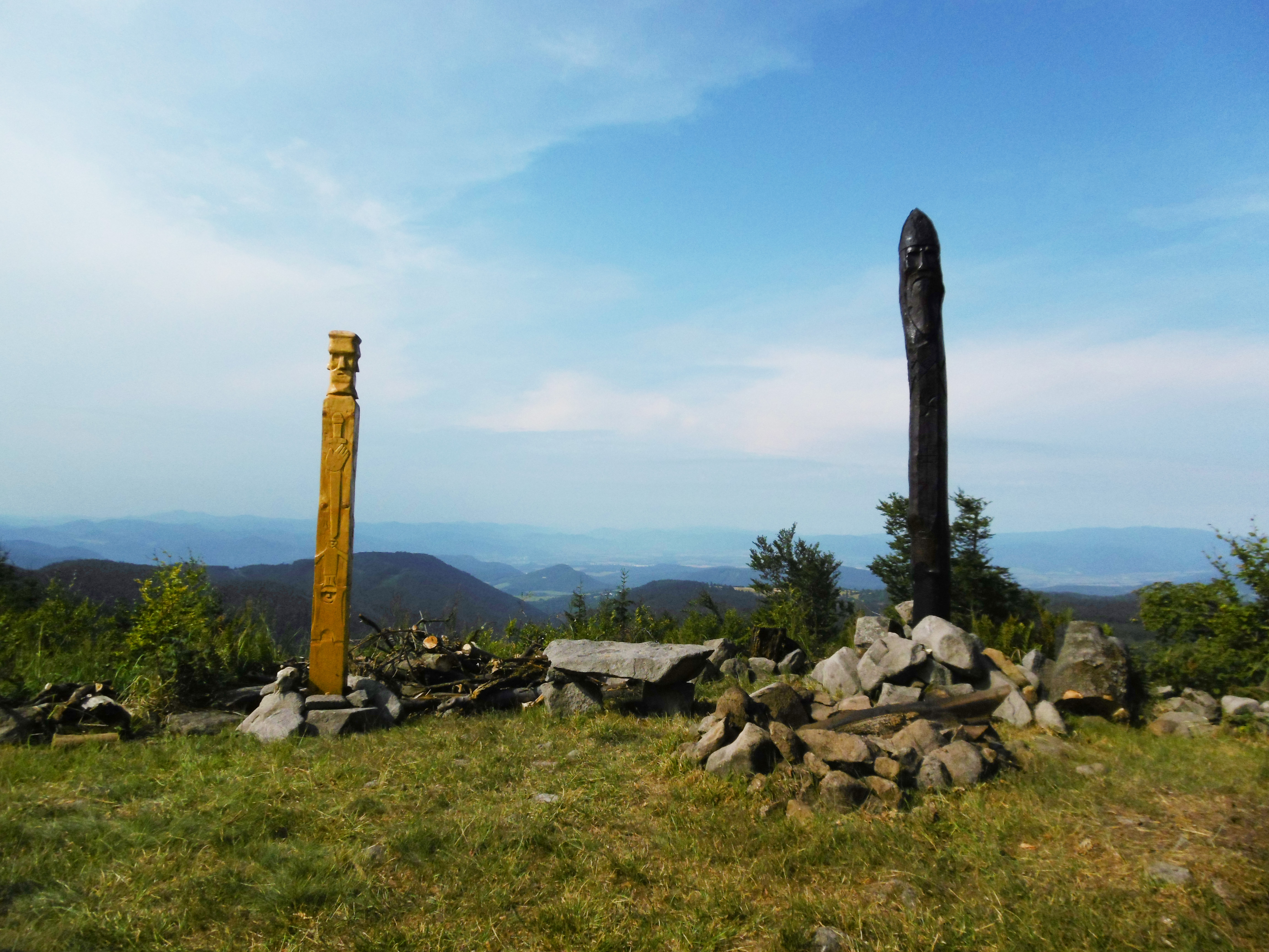 Kapiszcze na szczycie Smrečníka na Słowacji.